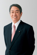 Minister Masatoshi Ishida.